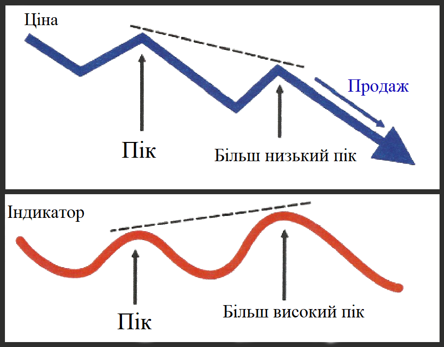 Скрита медвежа дивергенція на Форексі